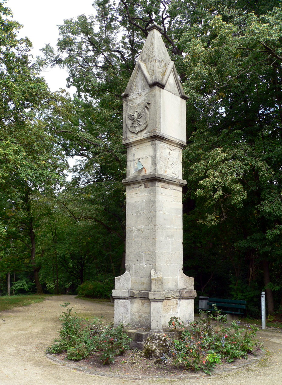 Die Turniersäule im Schlosspark Rosenau bei Coburg